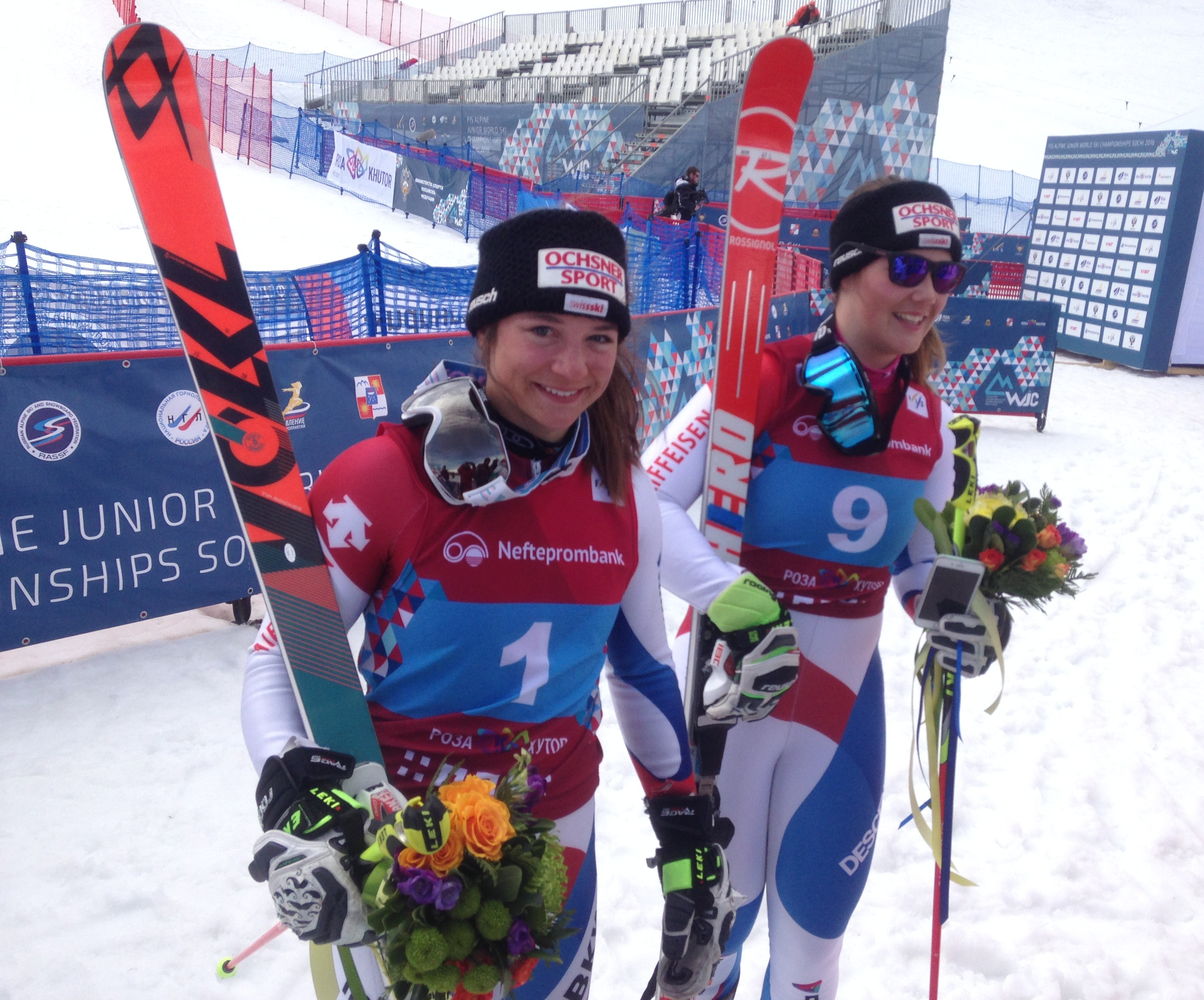 Чемпион мира 2016 года в гигантском слаломе среди юниорок Жасмина Сутер (слева) и бронзовый призер Мелани Мейллард, обе из Швейцарии по сле цветочной церемонии на горнолыжном курорте Роза Хутор.